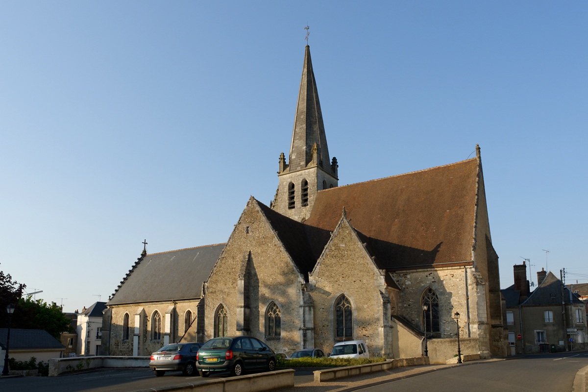 Eglise Saint-Pierre de Savigny sur Braye .